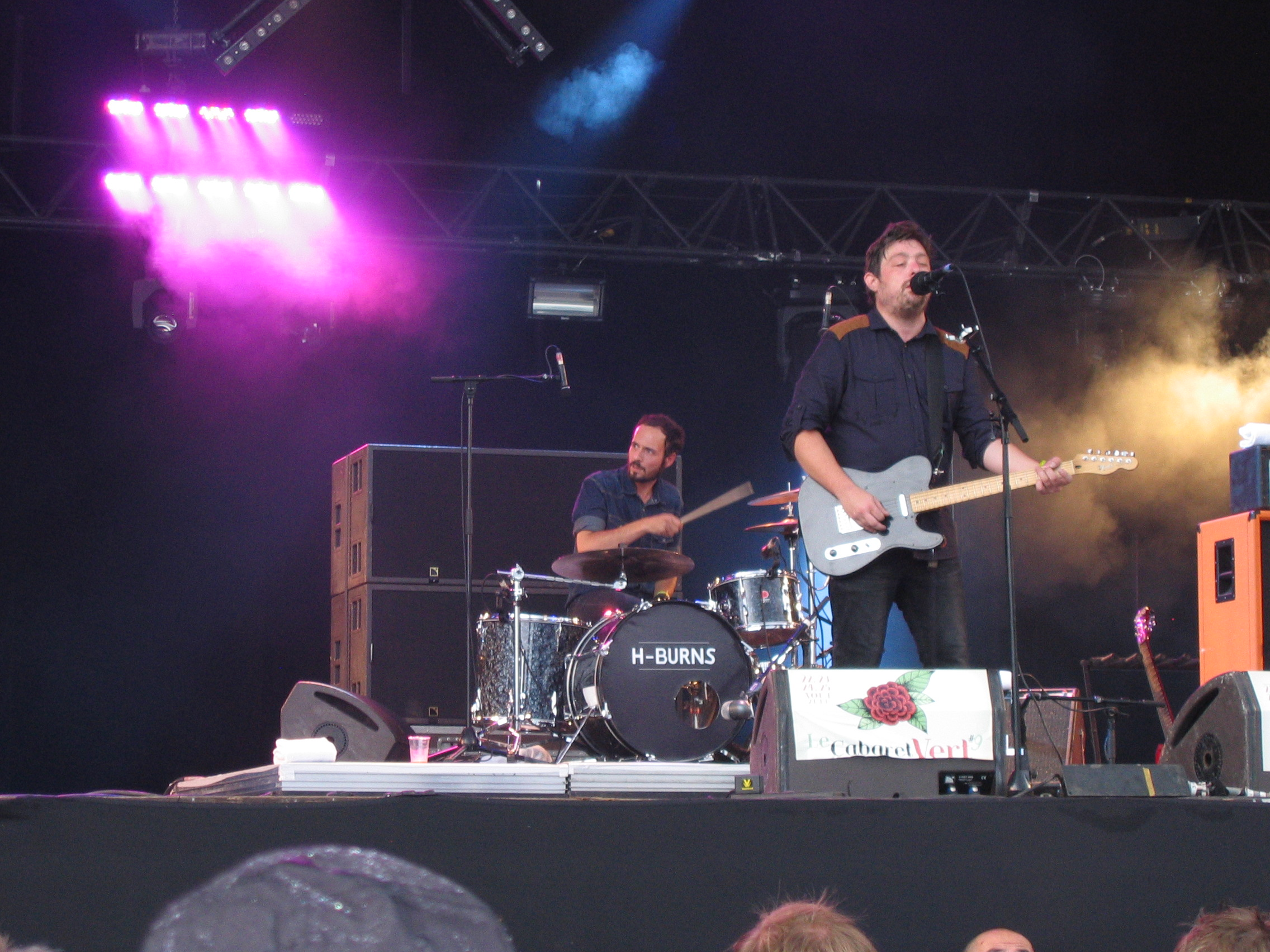 H-Burns au festival Cabaret Vert (Charleville-Mézières, Ardennes, France) le 24 août 2013